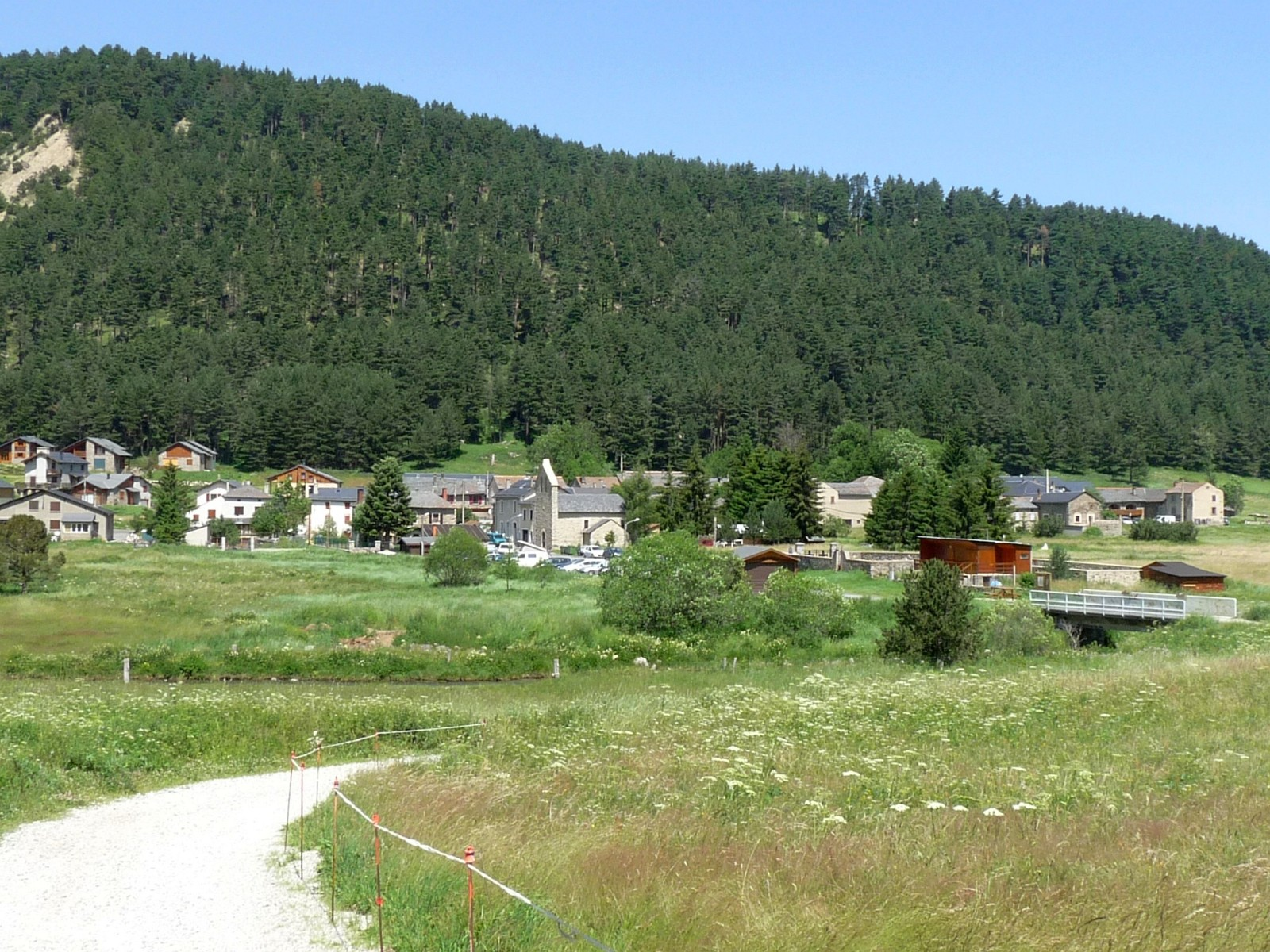 Espousouille et vallée du Galbe, Pyrénées-Orientales, France